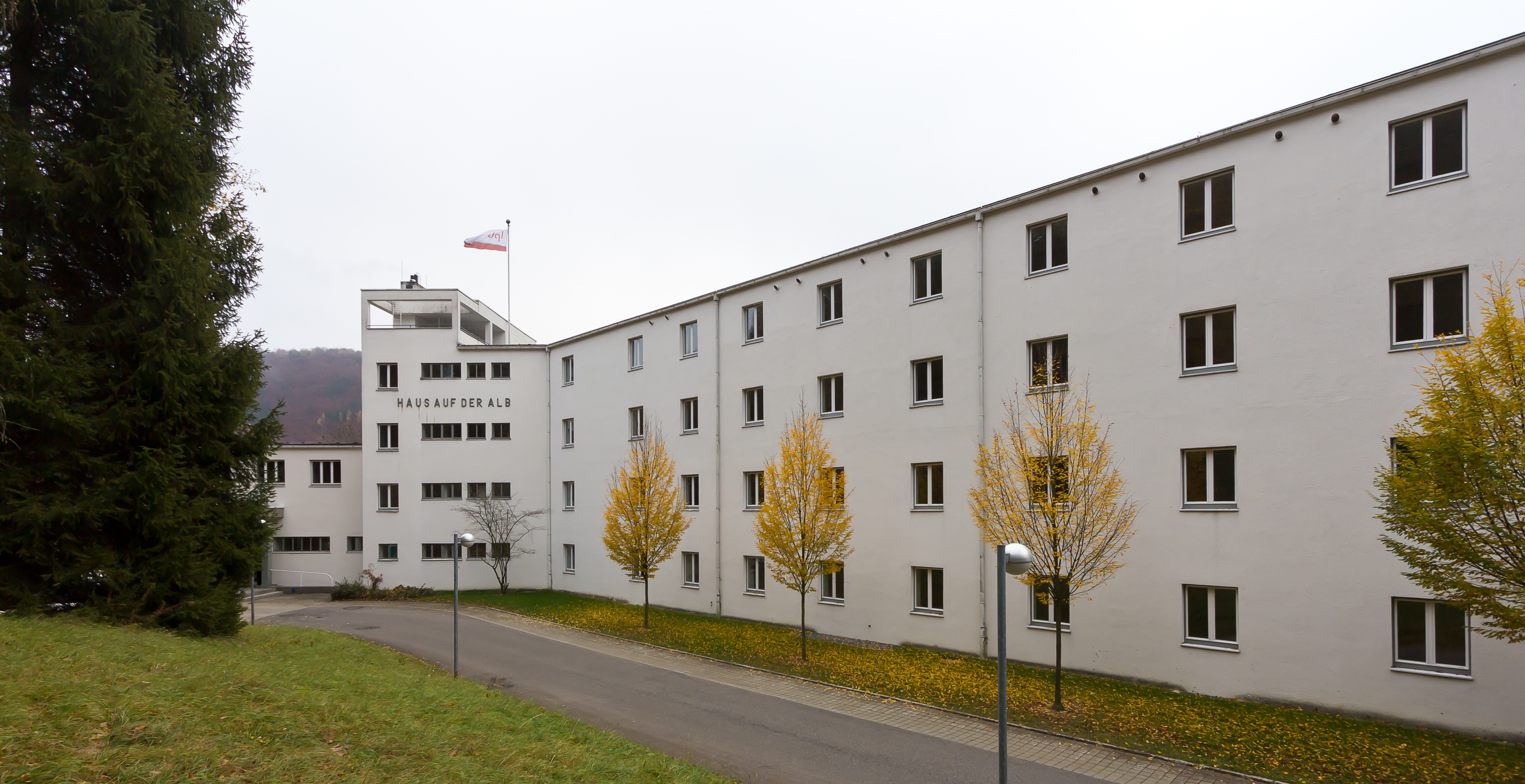 Das Haus auf der Alb, denkmalgeschützt, Vorderseite, Bad Urach im Herbst 2011